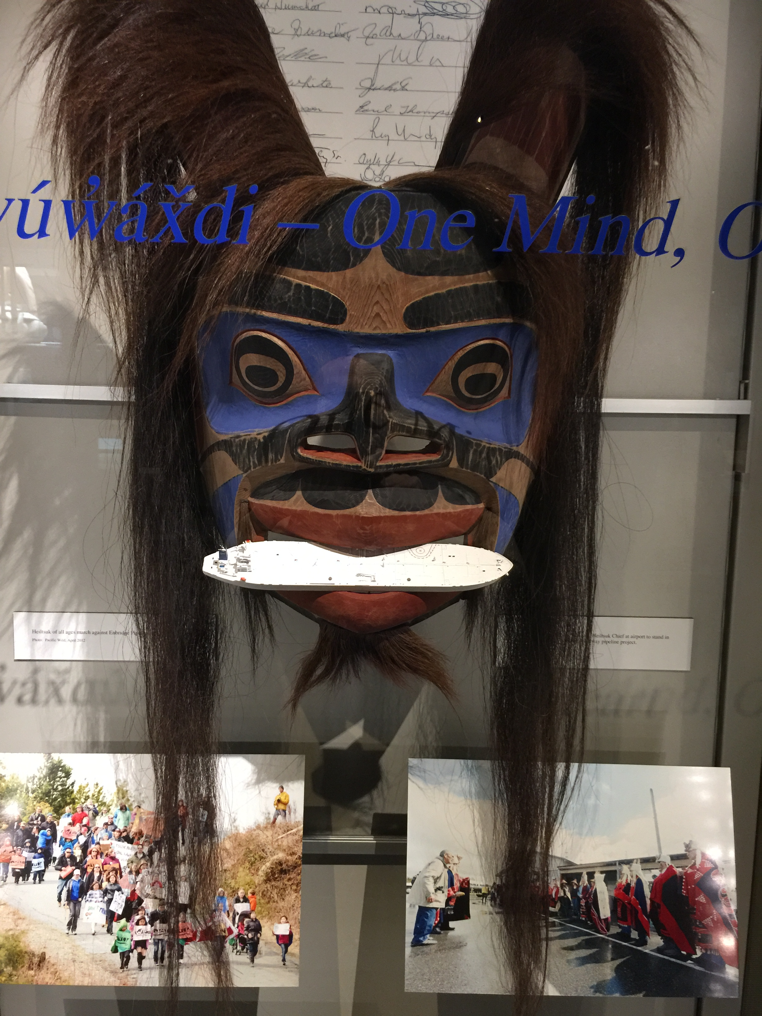 Cèdre rouge. Peinture acrylique. Crins de cheval. Métal. Le masque tient dans la bouche un pétrolier.